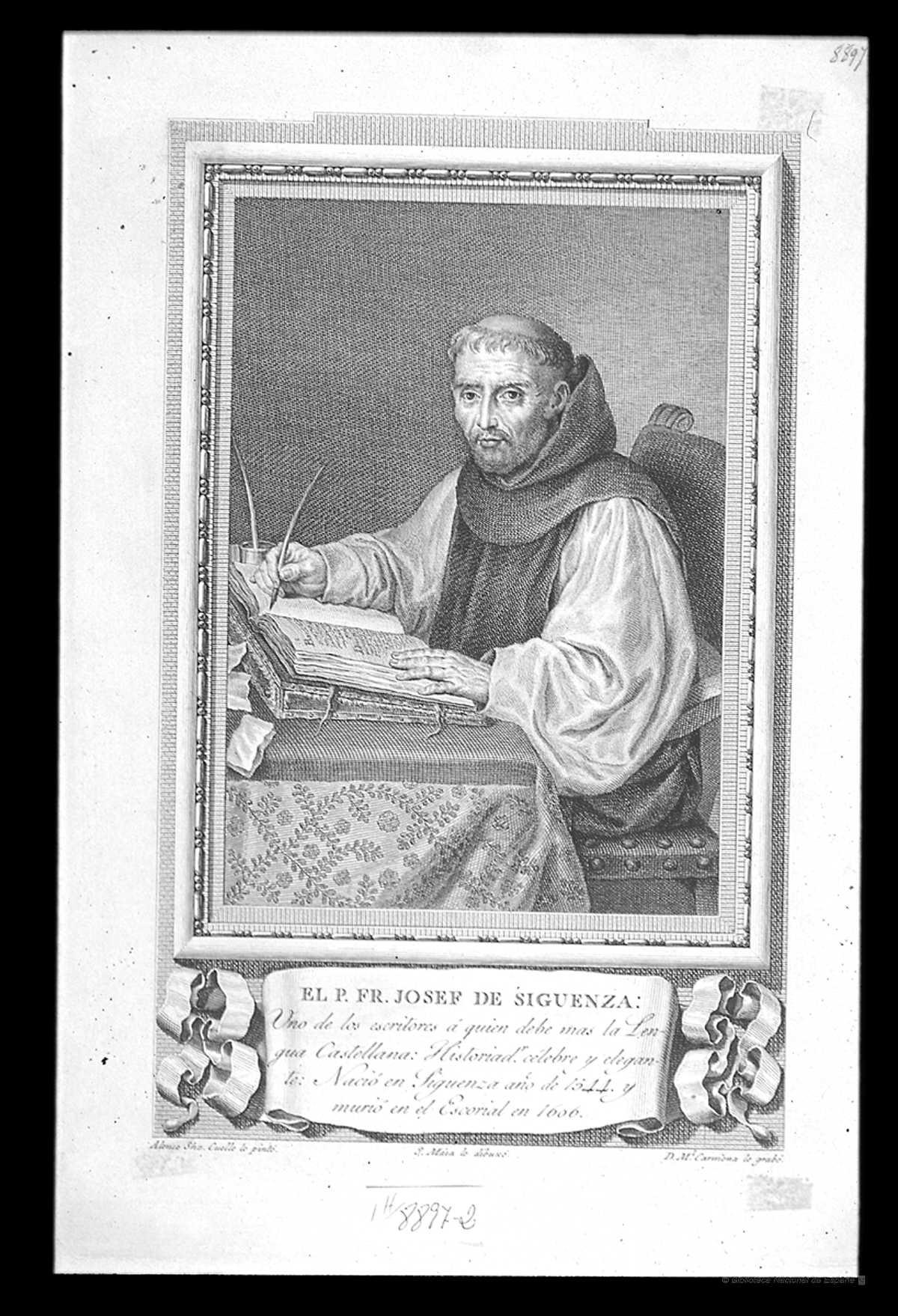 Retrato de Fray José de Sigüenza: Alonso Shz. Cuello lo pintó; J. Maea lo dibuxó; D. Ml Carmona lo grabó. Aguafuerte y buril, col. Retratos de los españoles ilustres, Madrid, en la Imprenta Real, 1791. Biblioteca Nacional, Madrid, Iconografia Hispana, 8897-2.